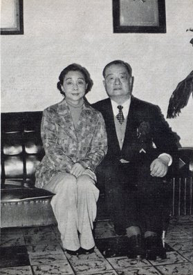 中文（台灣）: 戴校長和戴媽媽在中國海專時期的合照。